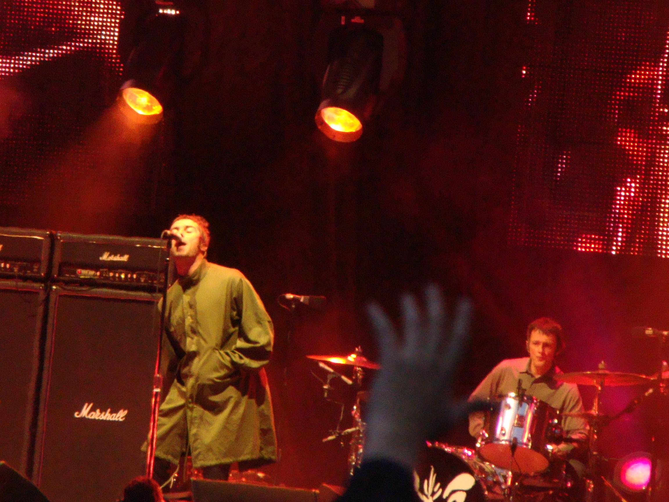 Oasis